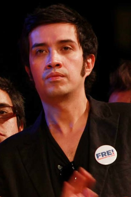 La cultura se tomó el Parque Forestal